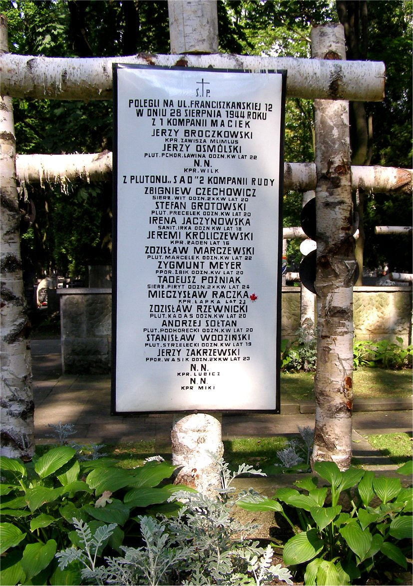 Kalendarium powstania warszawskiego - 28 sierpnia